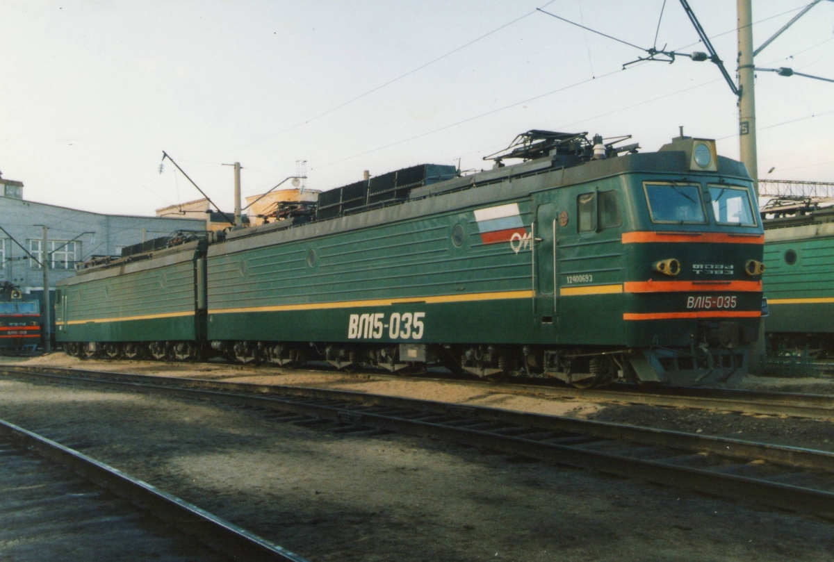 11.2009 — КР Челябинский ЭРЗ 03.2017 — СР Челябинский ЭРЗ